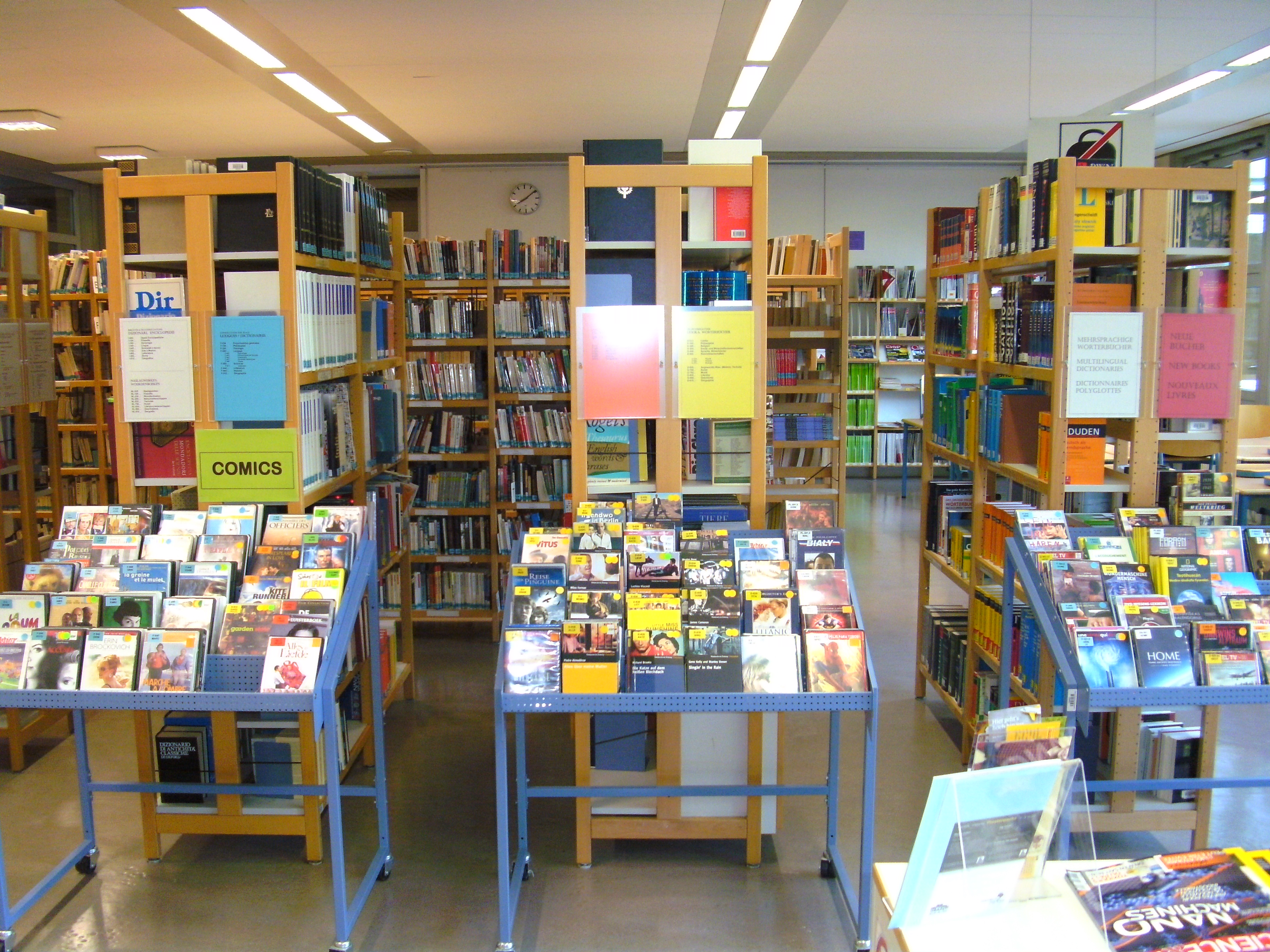 DVD-Angebot der Oberschulbibliothek der ES-Karlsruhe